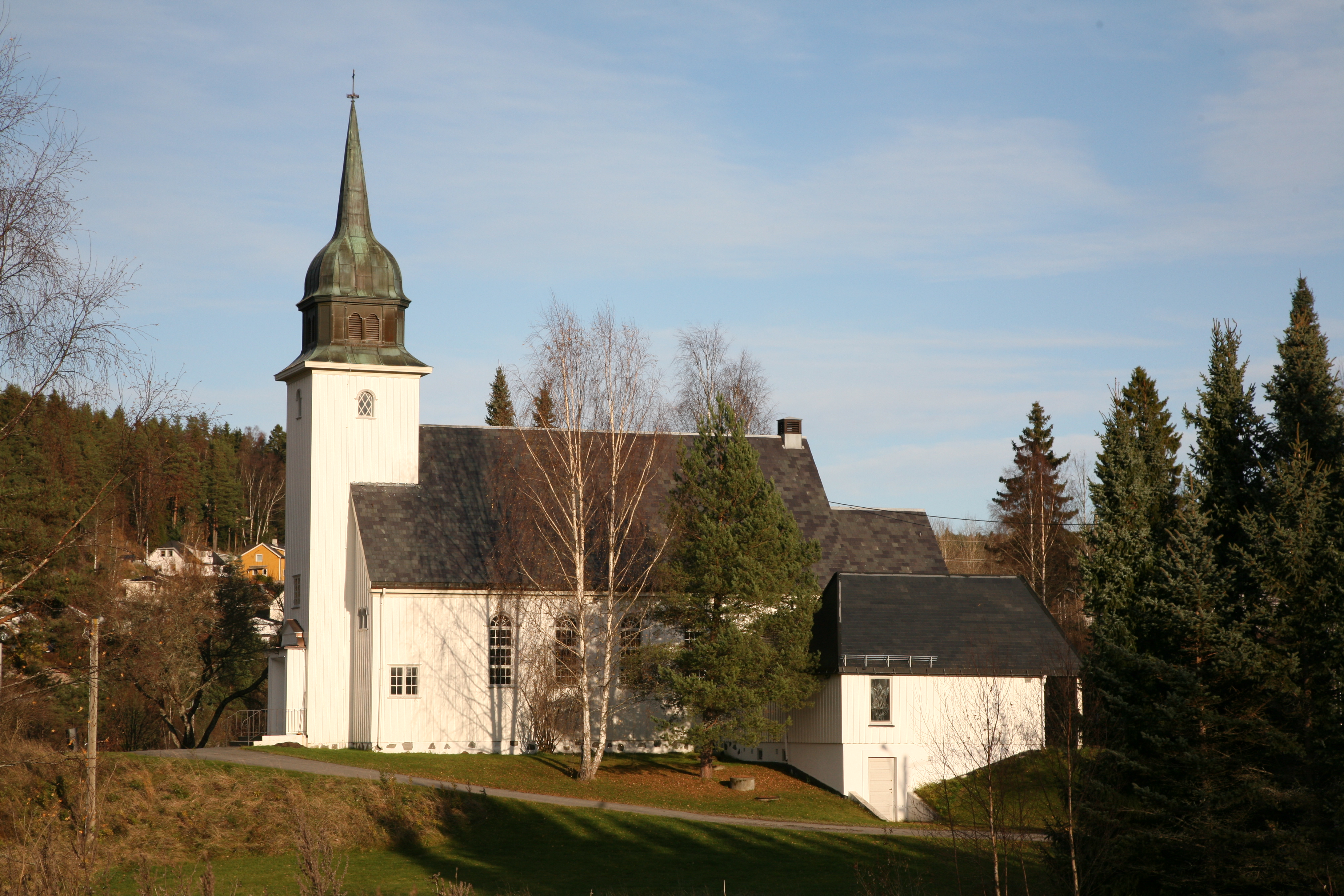 Klemedsrud kirke, a church in Oslo